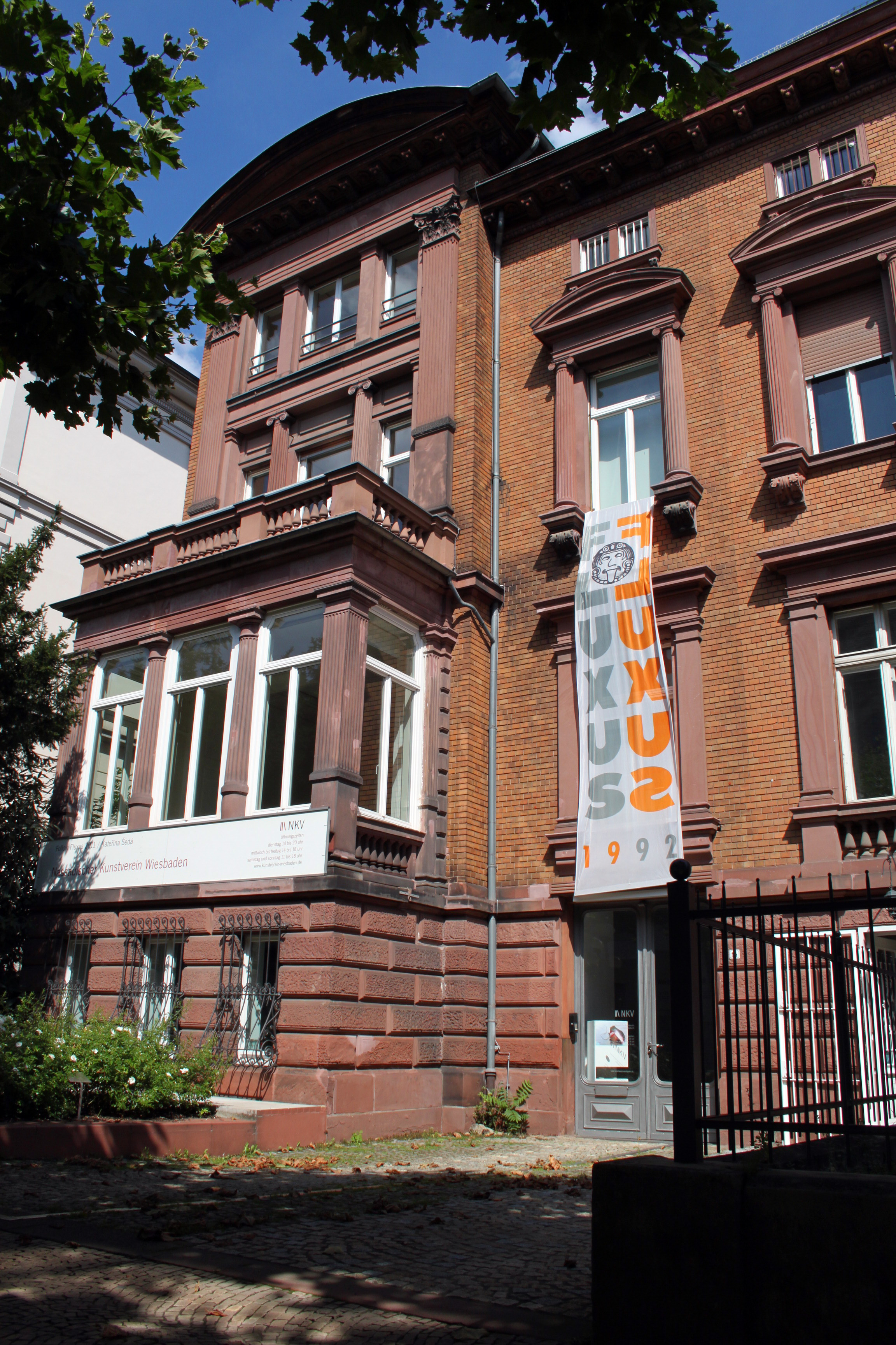 Wilhelmstraße 15